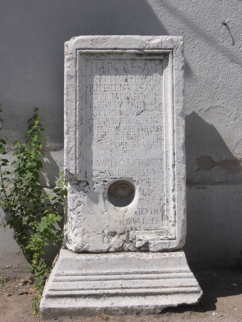 Споменик Септимију Северу у Белој Паланци.